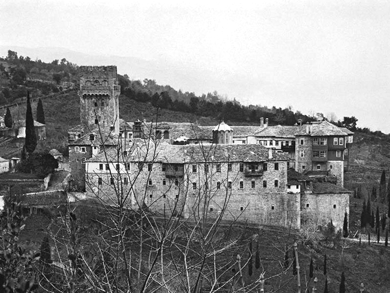 Монастырь Каракал, Афон